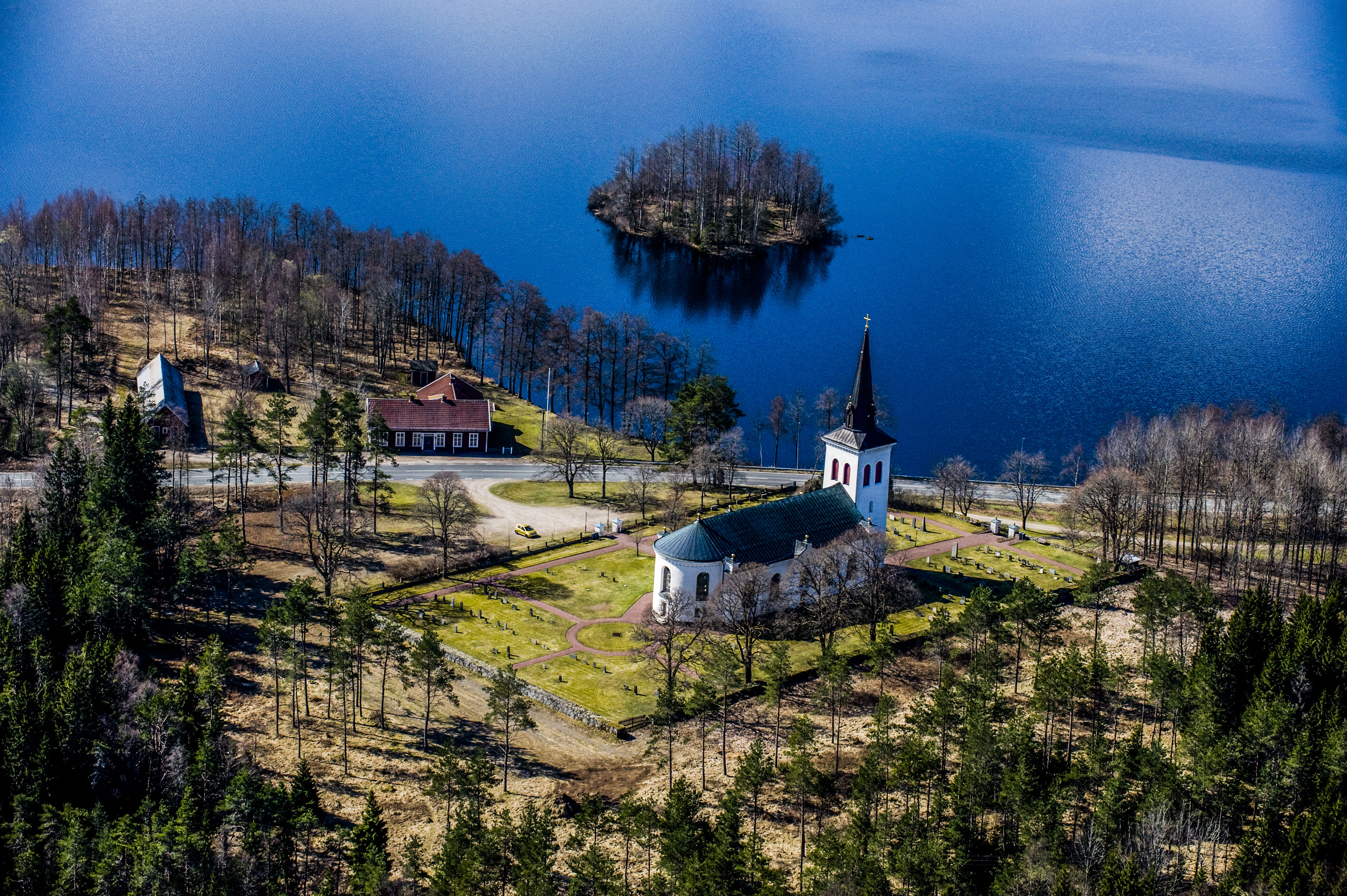 Almespkra kyrka